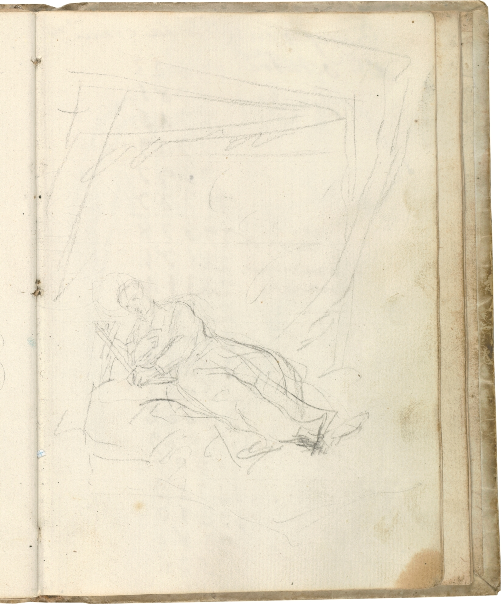 Muerte de San Francisco Javier. Dibujo preparatorio en el Cuaderno Italiano